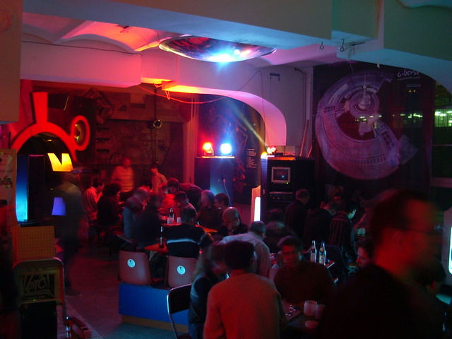 Innenraum der c-base (Berlin)